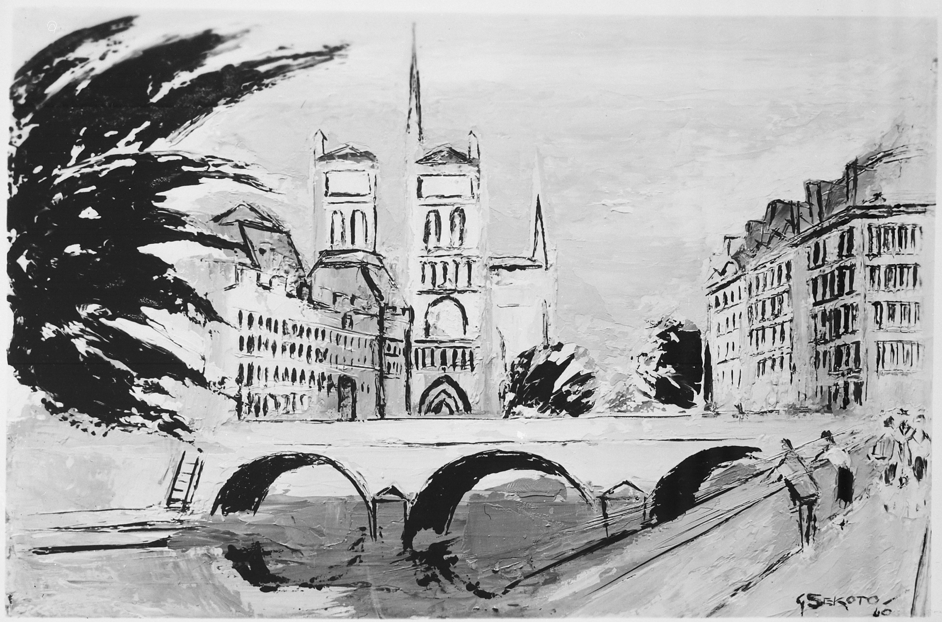 General notes: Oil